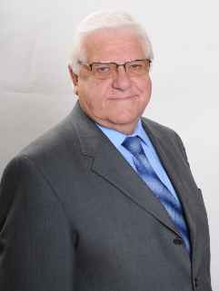 Diputado de la República de Chile, Enrique Jaramillo.